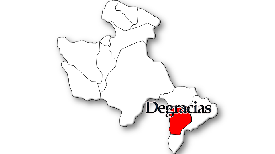 População